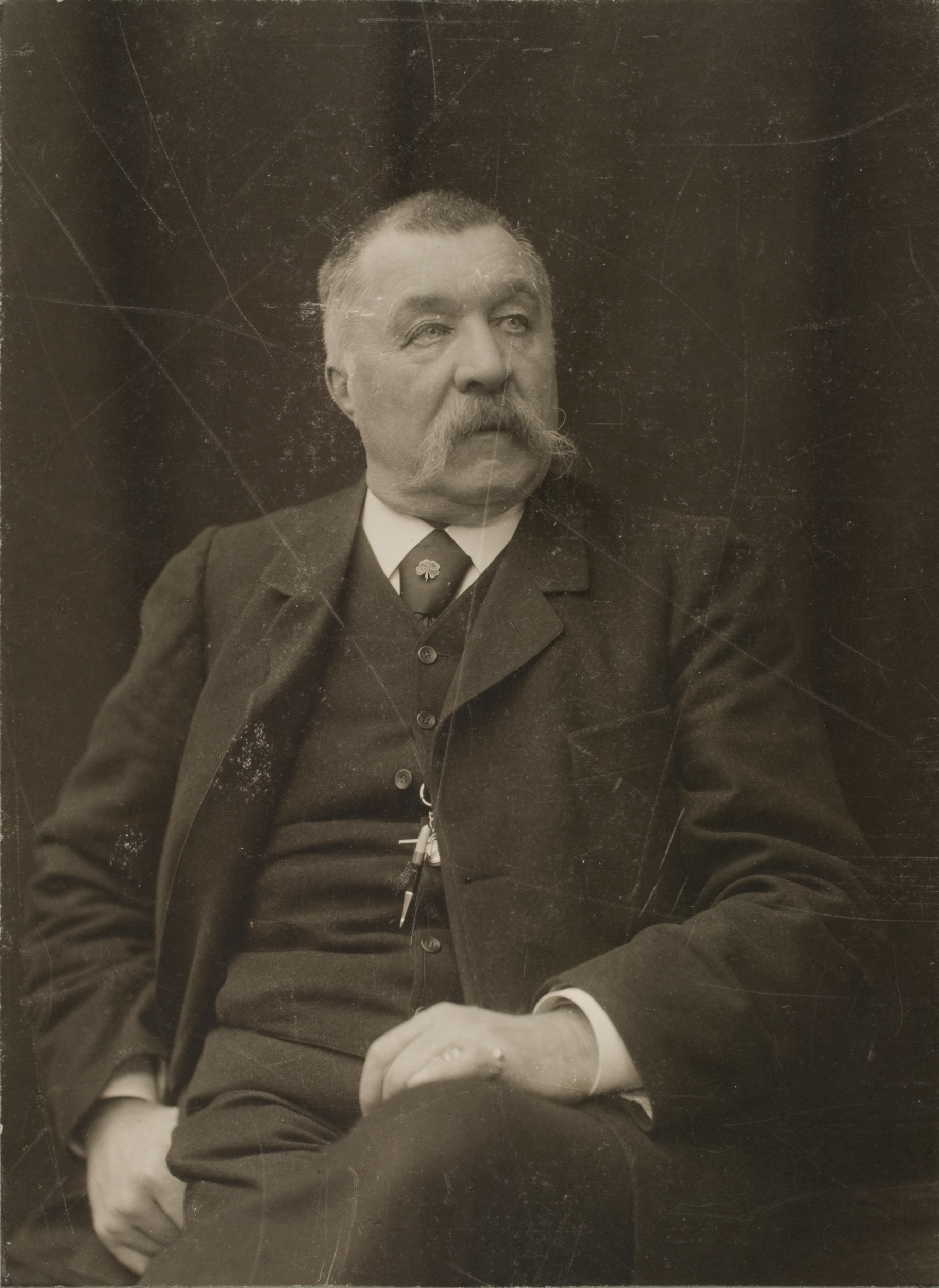 Magnus Hjalmar Munsterhjelm (1840-1905), suomalainen taidemaalari.